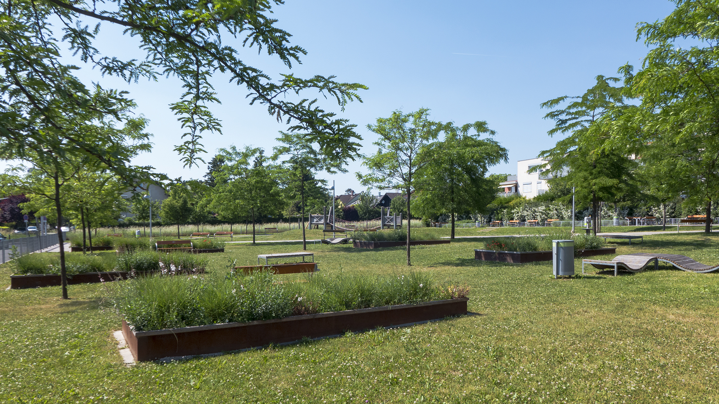 Grundäckerpark in Wien 10